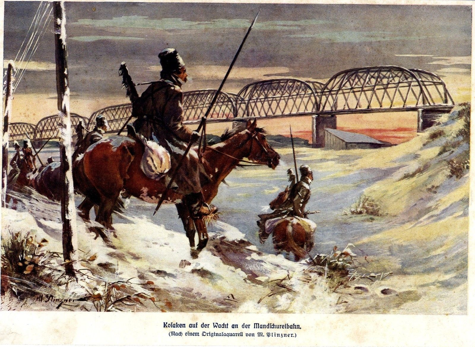 Kosaken auf der Wacht an der Mandschureibahn, Aquarell